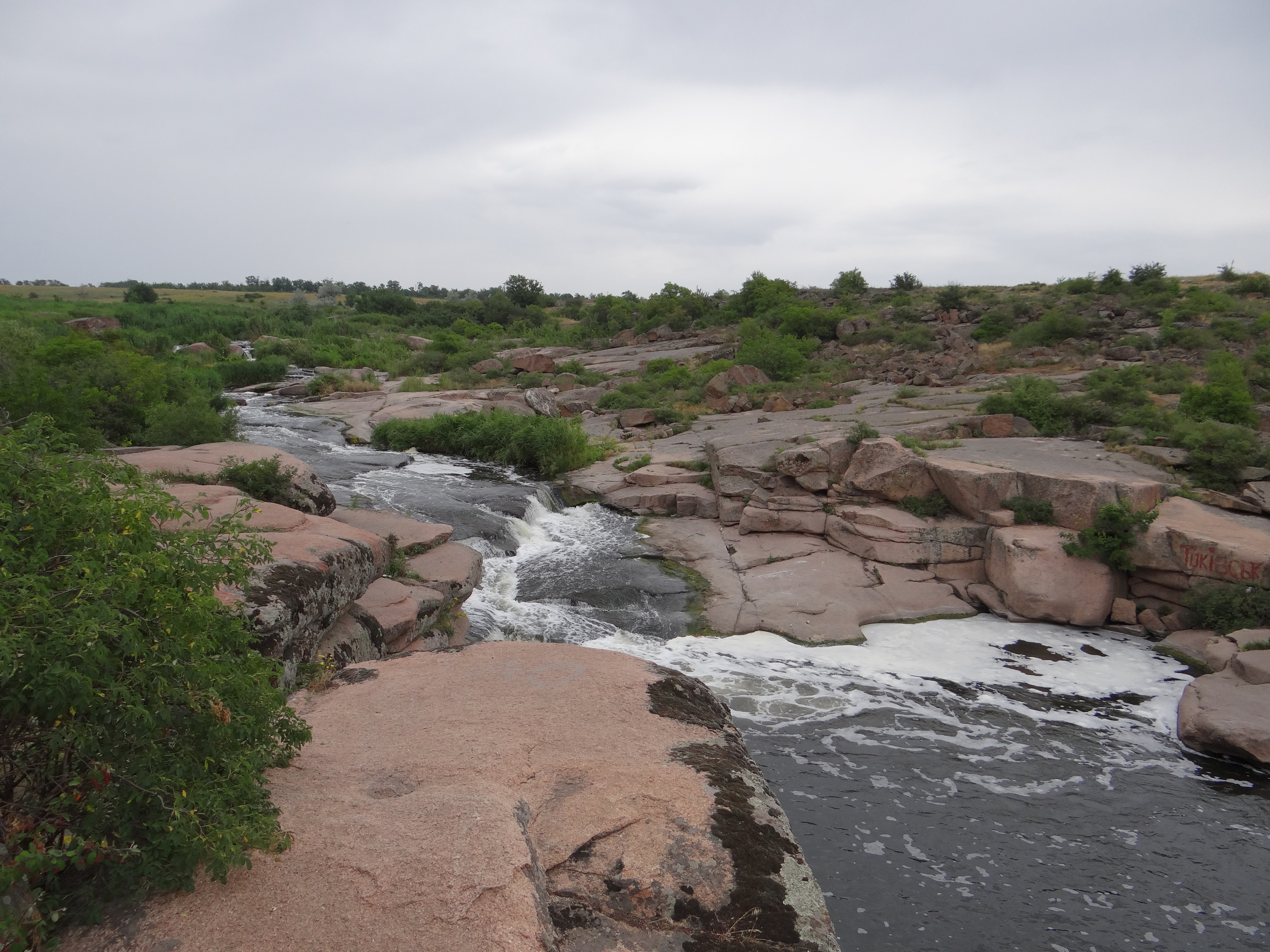 Токівський водоспад. Вигляд зі скелі внизу